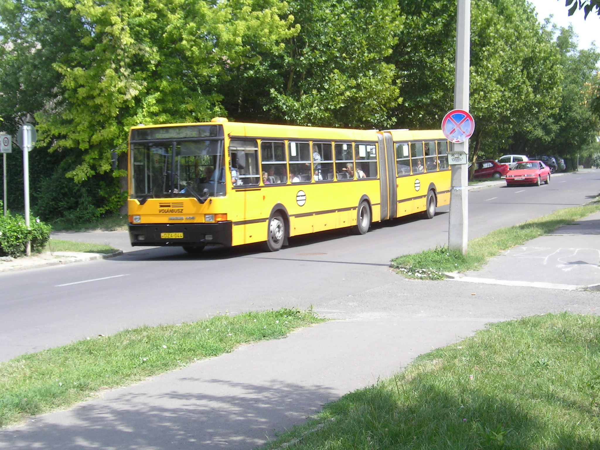 Ritka jelenség a 363-as busz vonalán: csuklós busz (IK435), Vác, Radnóti út és Fürj utca sarka